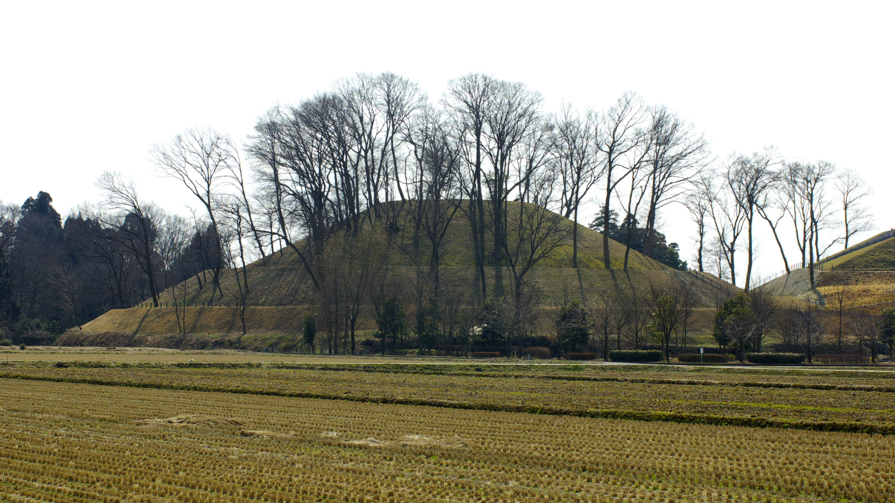 秋常山1号墳後円部遠望。石川県能美市。